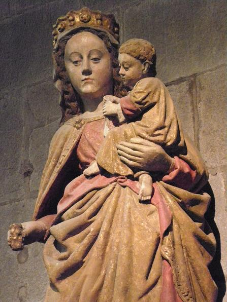 Statue de Notre-Dame de la Grande-Porte. Cathédrale Saint-Vincent de Saint-Malo (35).